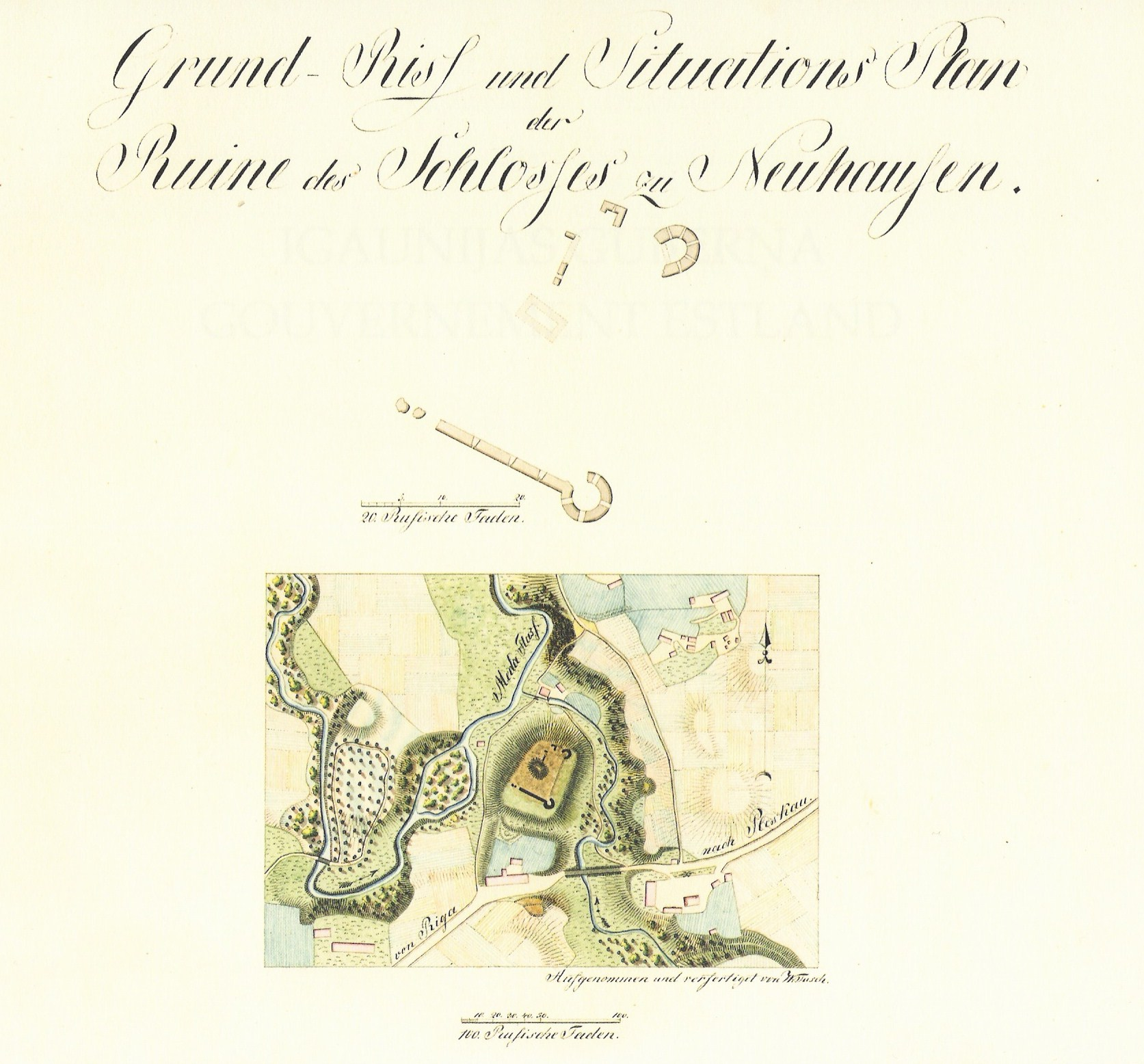 Vastseliina linnuse asendiplaan. Paulucci album